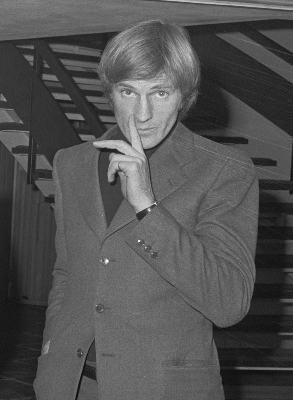 Voetbalclub Juventus (Italie) traint in Enschede; spelers in hotel in Boekelo, Francesco Morini.